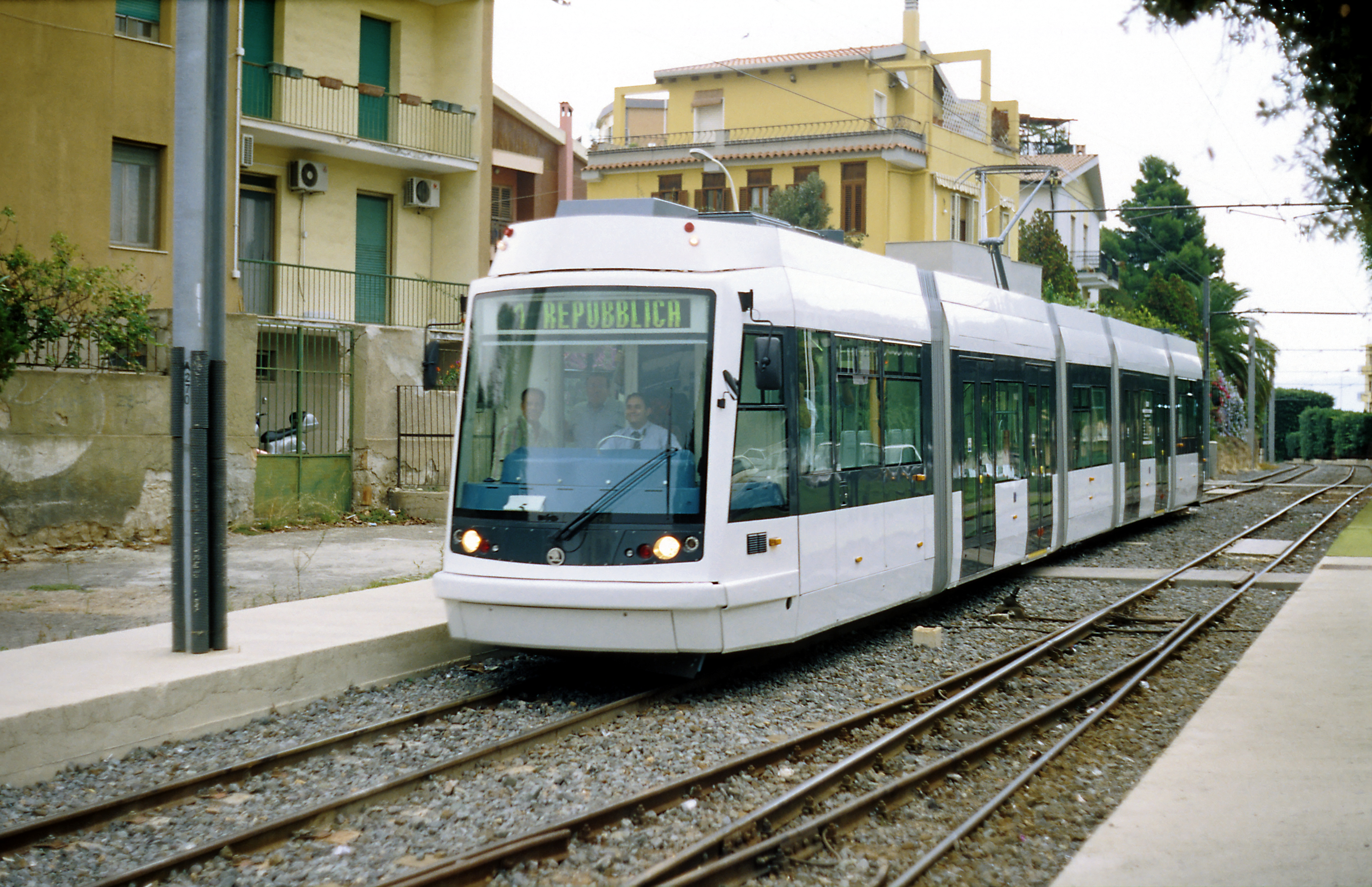 Probefahrten vor der Aufnahme des Stadtbahnbetriebes auf der Stadtstrecke Piazza Repubblica–San Gottardo Richtung Piazza Repubblica. Der Oberbau stammt hier noch von der Fernbahnbetriebszeit.